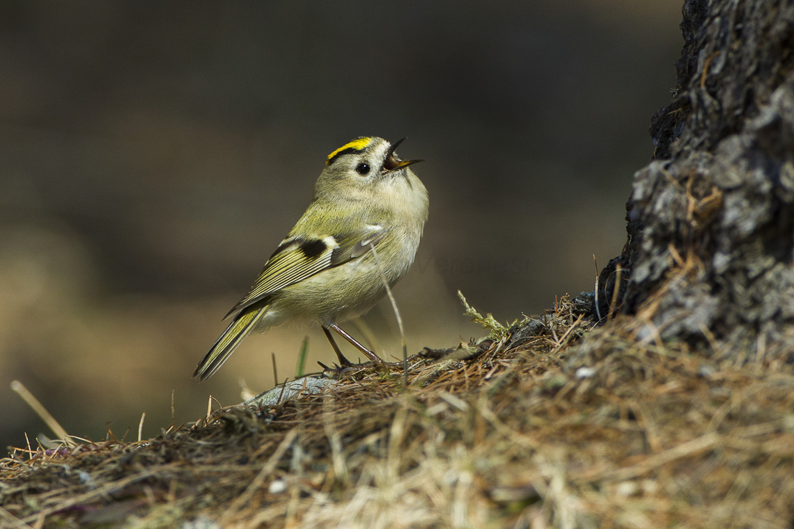 Goldcrest ( Regolo ) - Val d'Aosta - Italy_S4E4153